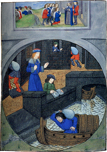 Het graan wordt de stad binnengebracht onder het oog van een toezichter en een klerk die alles keurig noteert. Hier is het inslaan van voedingsmiddelen door de joden in Egypte voorgesteld. Miniatuur in de Biblia figurata, gemaakt voor Raphaël de Mercatellis, Gent (?), eind 15e eeuw. Gent, Kathedraal, Ms. 10, fol. 71v